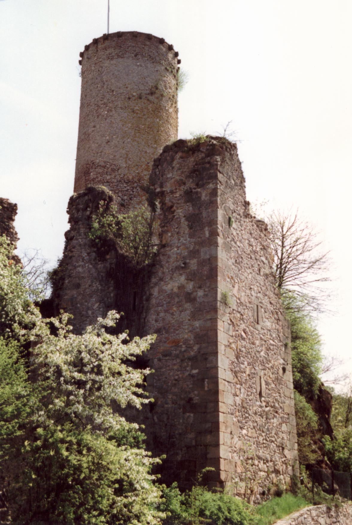 Burg Veldenz, Reste des Berings mit Bergfried